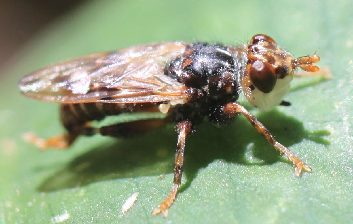 Blasenkopffliege Myopa buccata am 24. April 2019 in einem Wald nahe Walldorf/Baden